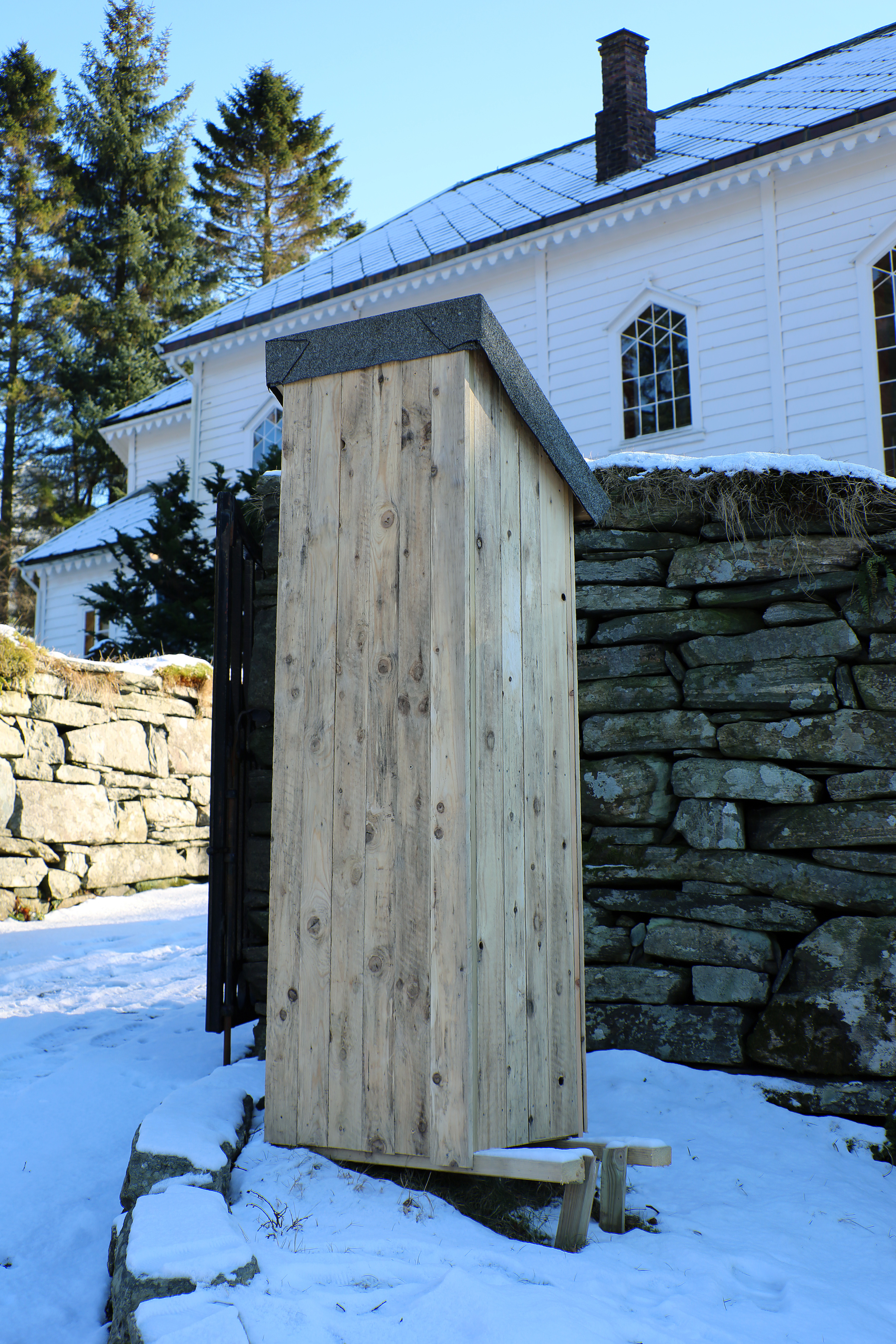 Steinkorsene i Eivindvik Steinkorsene i Eivindvik